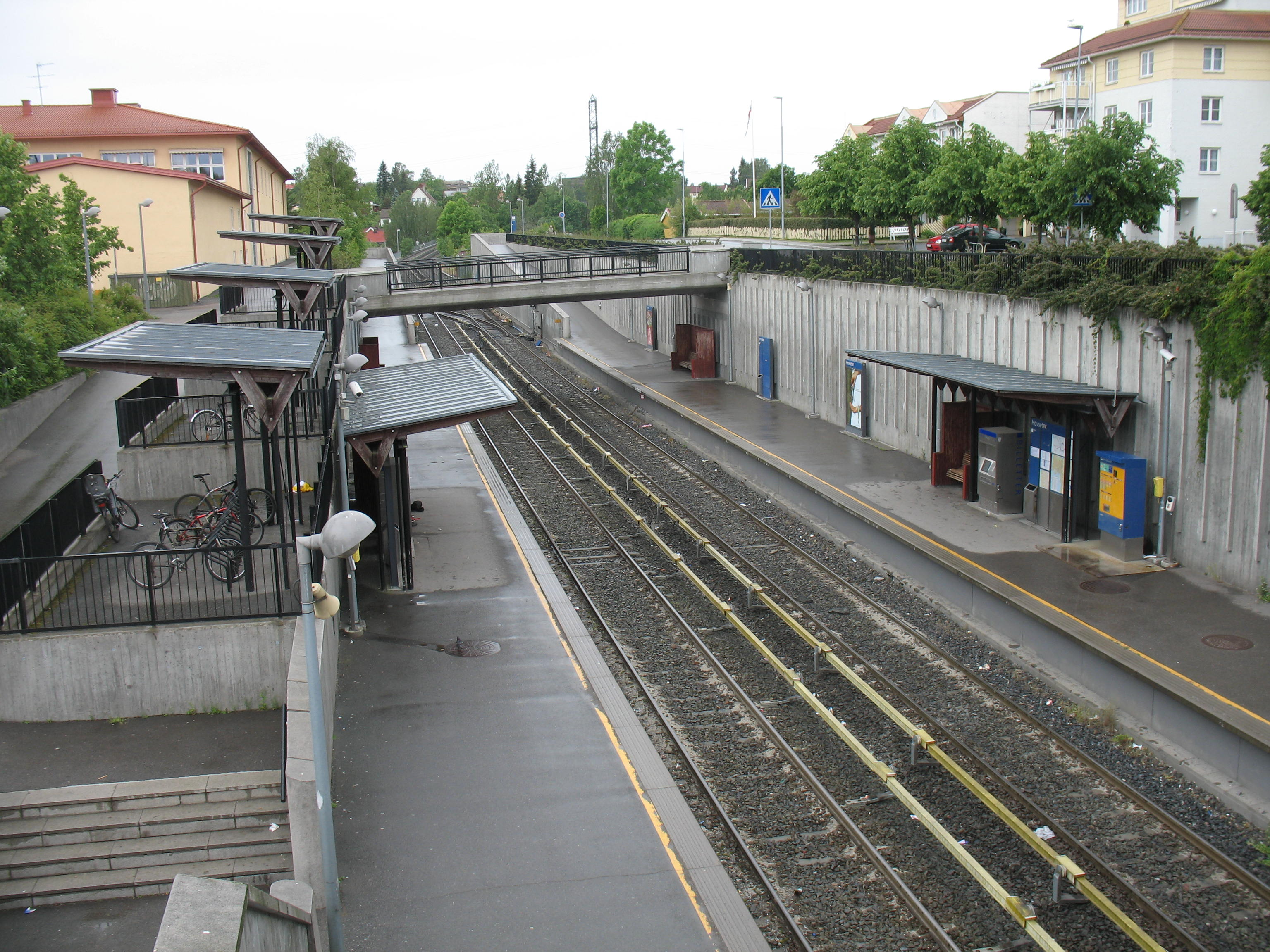 Hovseter, en T-banestasjon i Oslo